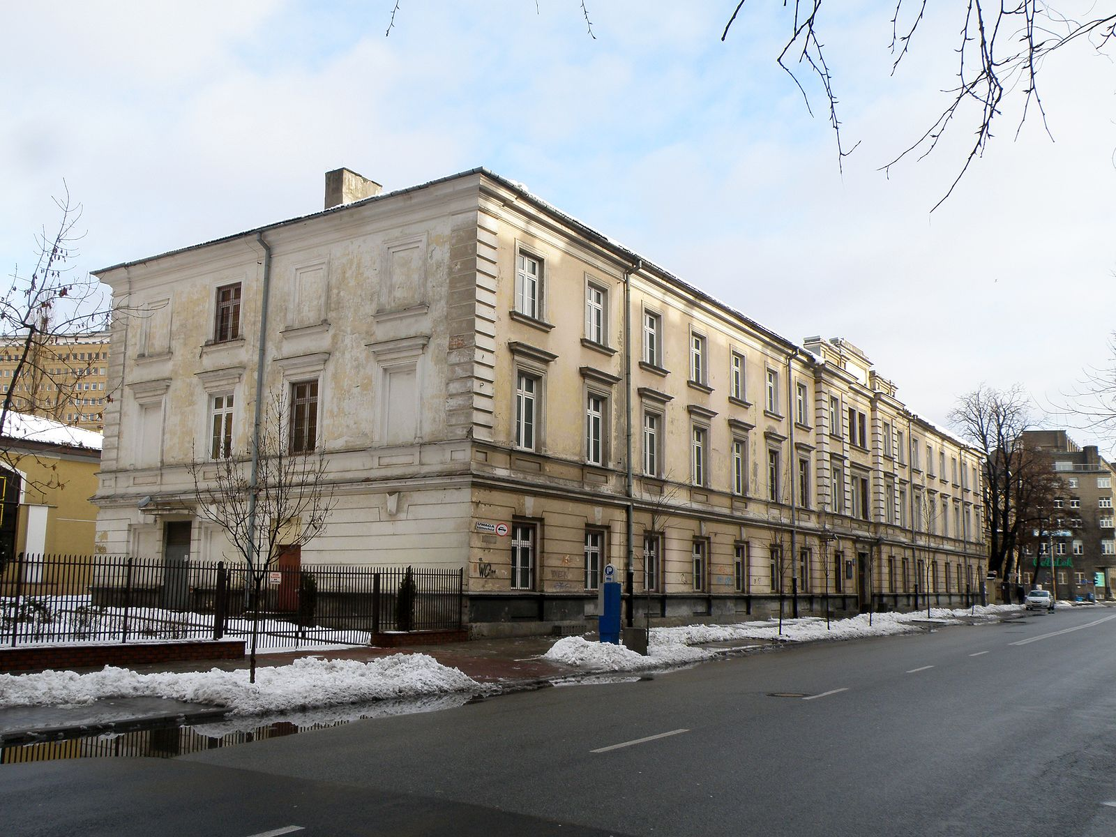 Warszawa, ul. Koszykowa Budynek z czasów carskich. W 1946-1950 siedziba Wojskowego Sądu Rejonowego. Później Wojskowa Komenda Uzupełnień dlaa Woli i Śródmieścia.